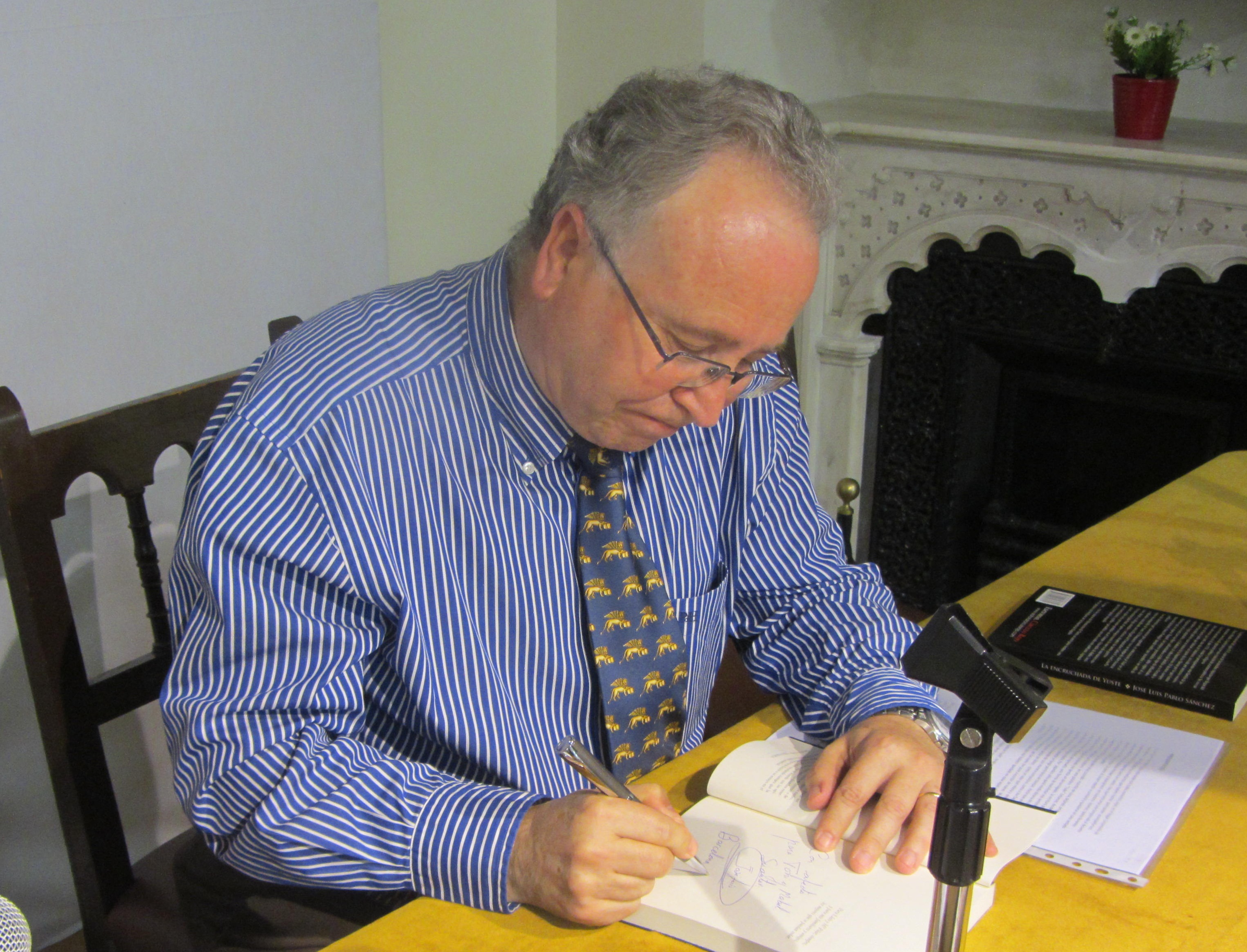 José Luis Pablo Sánchez en 2018